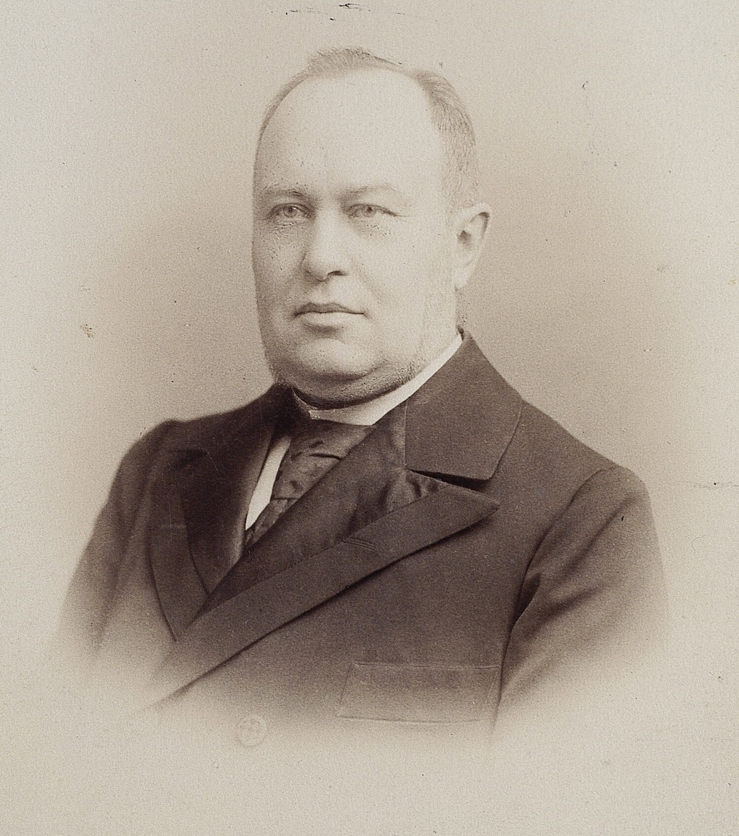 Józef Montwiłł, ok. 1895 r.